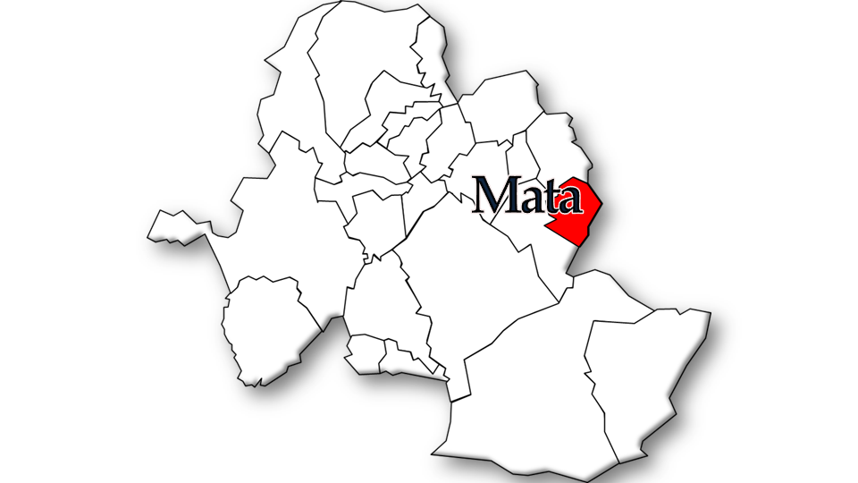 População